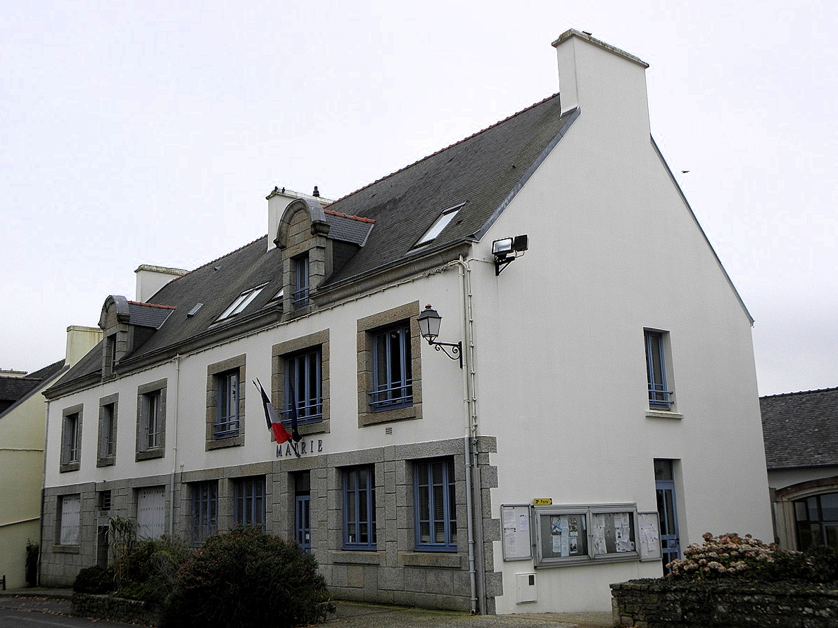 Mairie de Plogonnec (29).